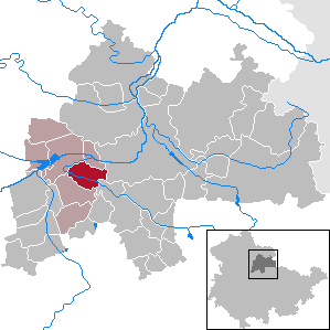 Werningshausen in Thuringia - District Sömmerda